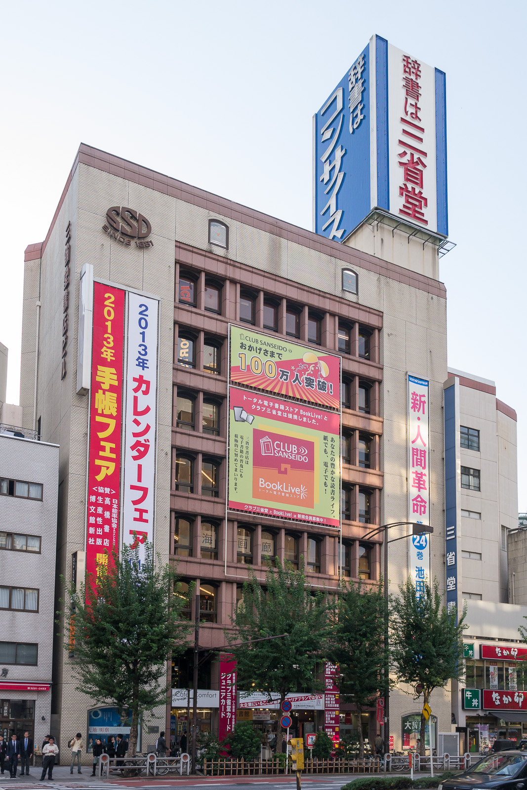 三省堂書店本店ビル、東京都千代田区神田神保町。